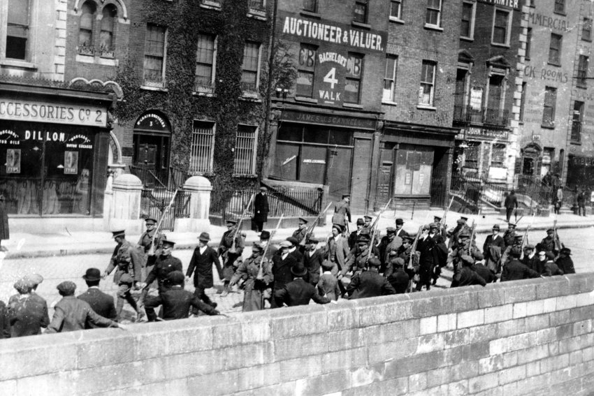 Dublin im April 2016 - Osteraufstand - britische Soldaten führen Gefangene ab